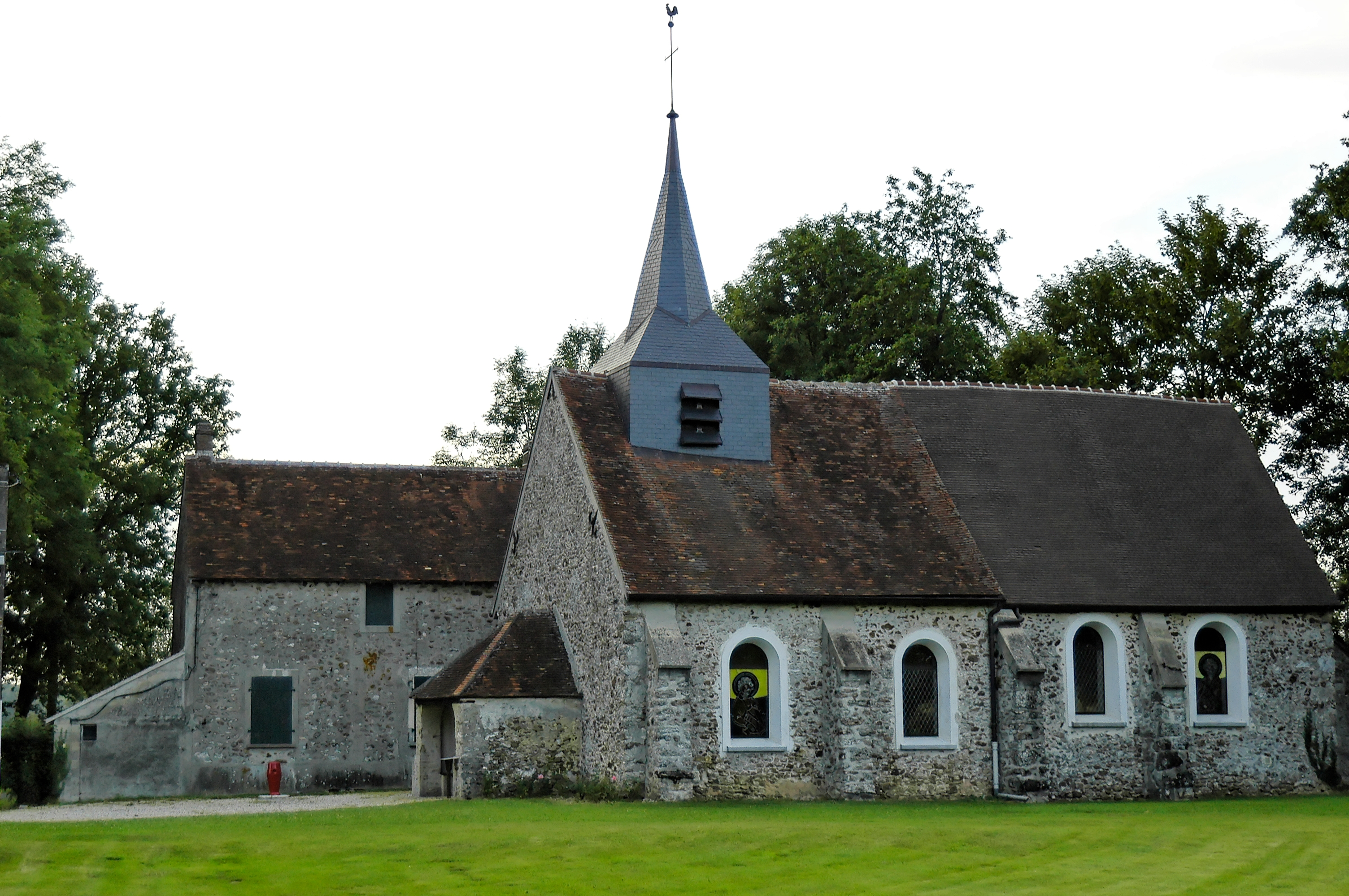 L'église de Rozoy-Bellevalle.